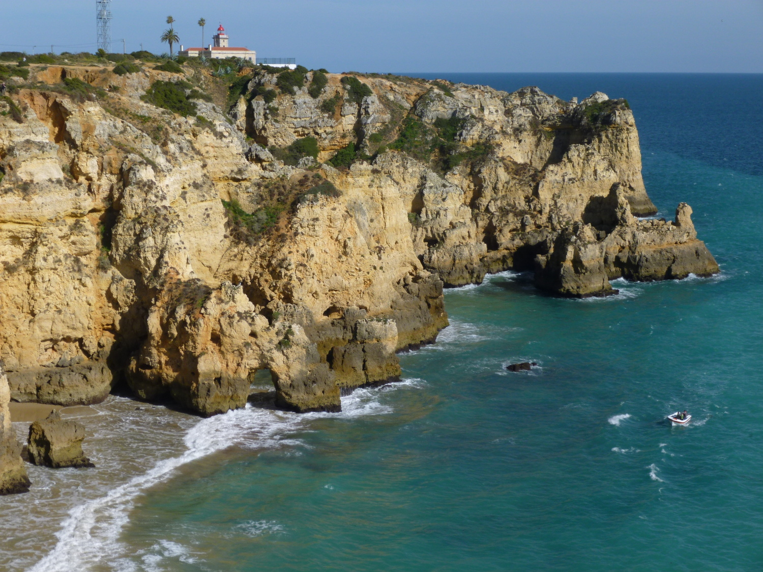 43 Ponta de Piedade